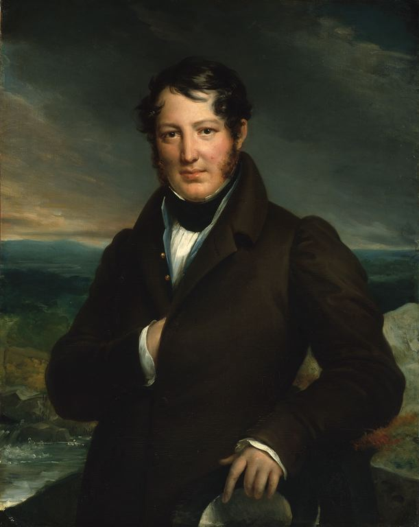 Portrait de François, Aldégonde, Xavier Tortoni (1800-1876), cousin de François Gérard.